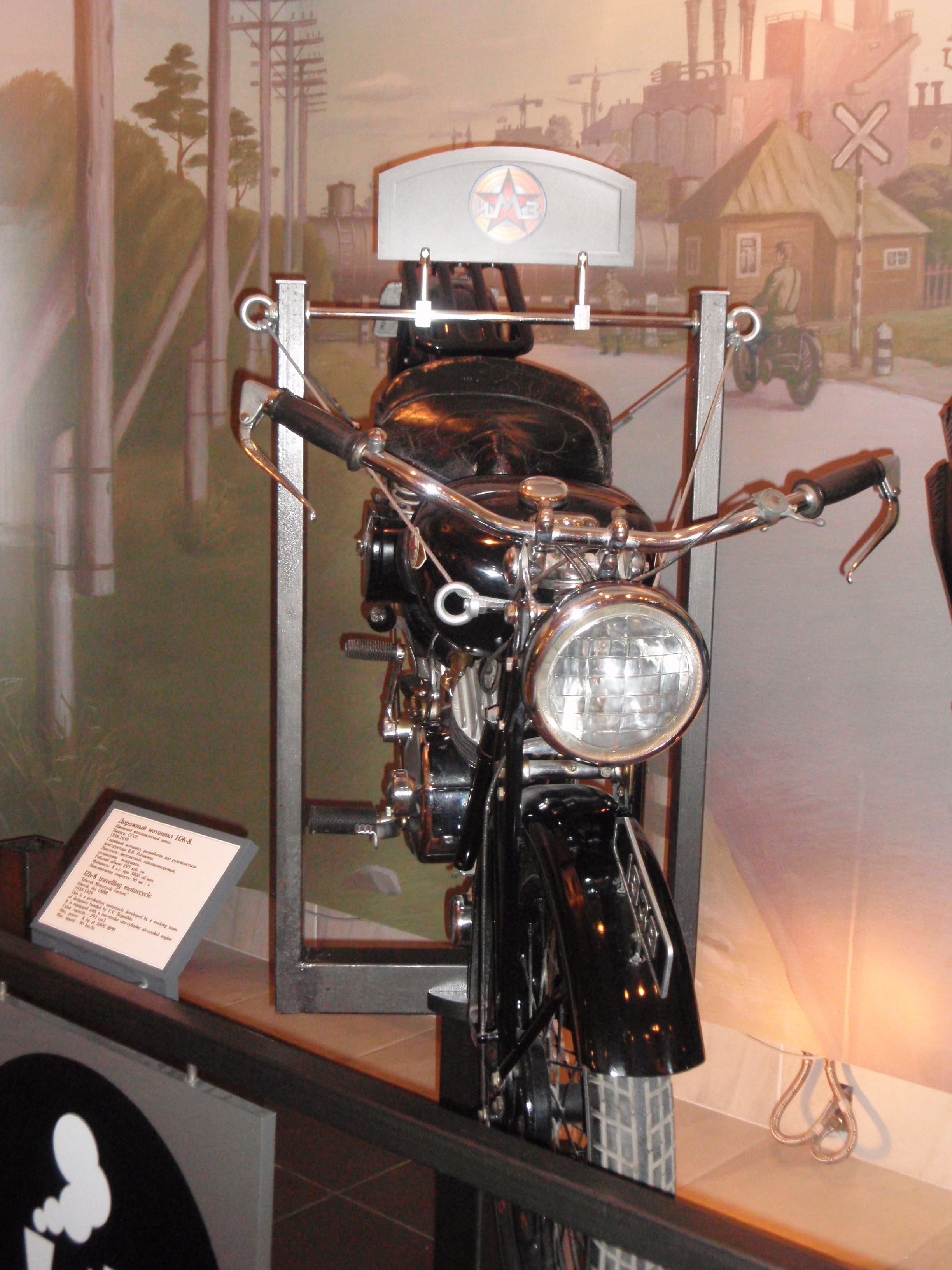 Советский дорожный мотоцикл Иж-8, Государственный Политехнический музей (г.Москва)